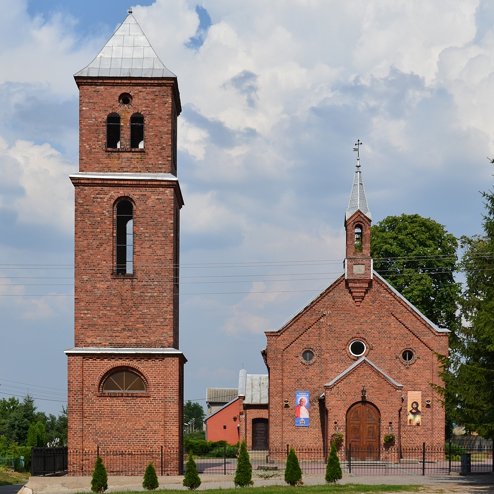 Kościół pw. św. Antoniego (1878-1881) i dzwonnica (1891)